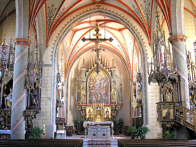 Pfarrkirche St. Anna (Waal bei Landsberg am Lech, Landkreis Ostallgäu, Bayerisch-Schwaben). Innenansicht nach Osten. Eigene Aufnahme, Juli 2007 / Parish church St. Anne (Waal near Landsberg am Lech, Bavaria, Germany). Interior, looking east. Own photo, July 2007